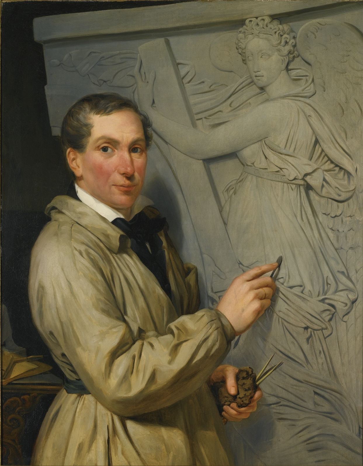 Anonyme, Portrait de Charles-René Laitié modelant la Force, vers 1800, vente Sotheby's du 12 novembre 2013, n°29